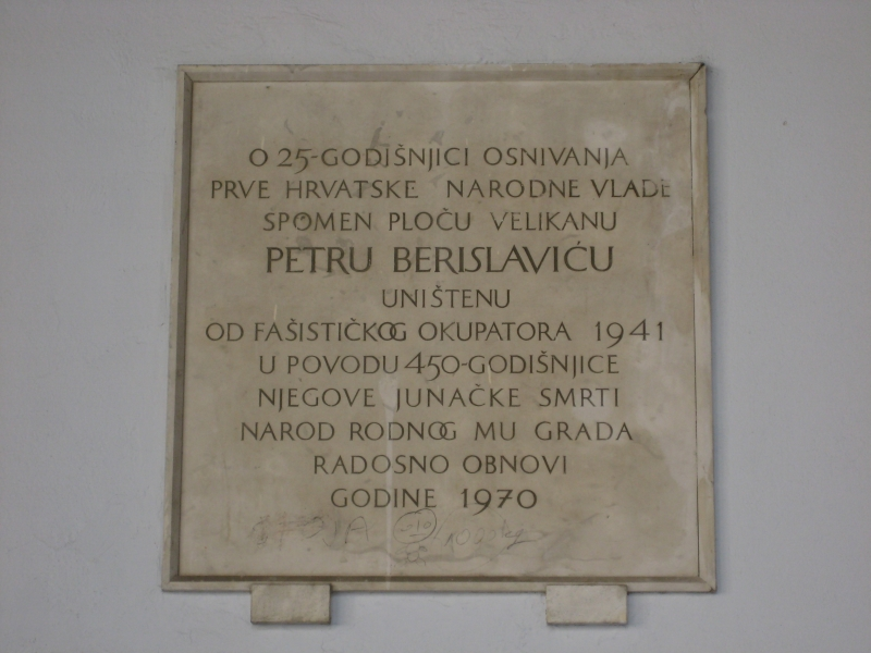 Spomen ploča uz spomenik Petra Berislavića, Trogir, Croatia